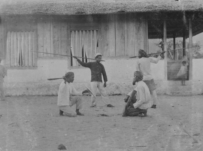 foto. Demonstraties van speerwerpen en vechten met zwaard en schild door mannen in een dorp op Boeroe.